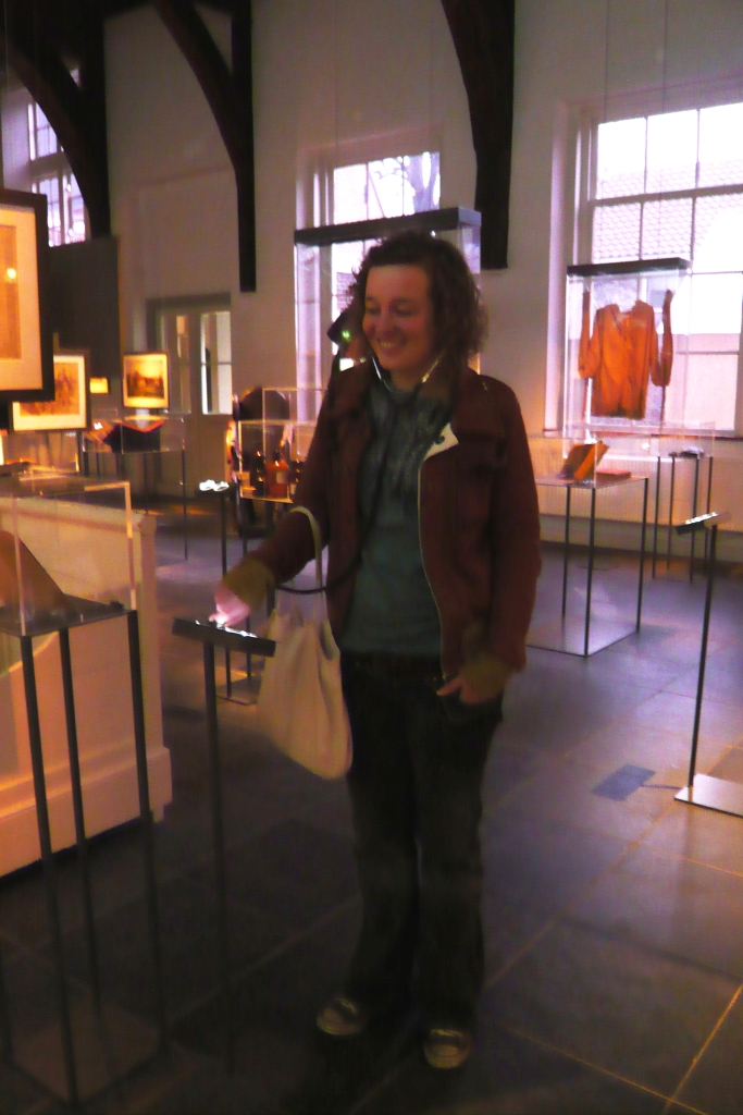 Het Dolhuys in Haarlem, Museum voor Psychiatrie.